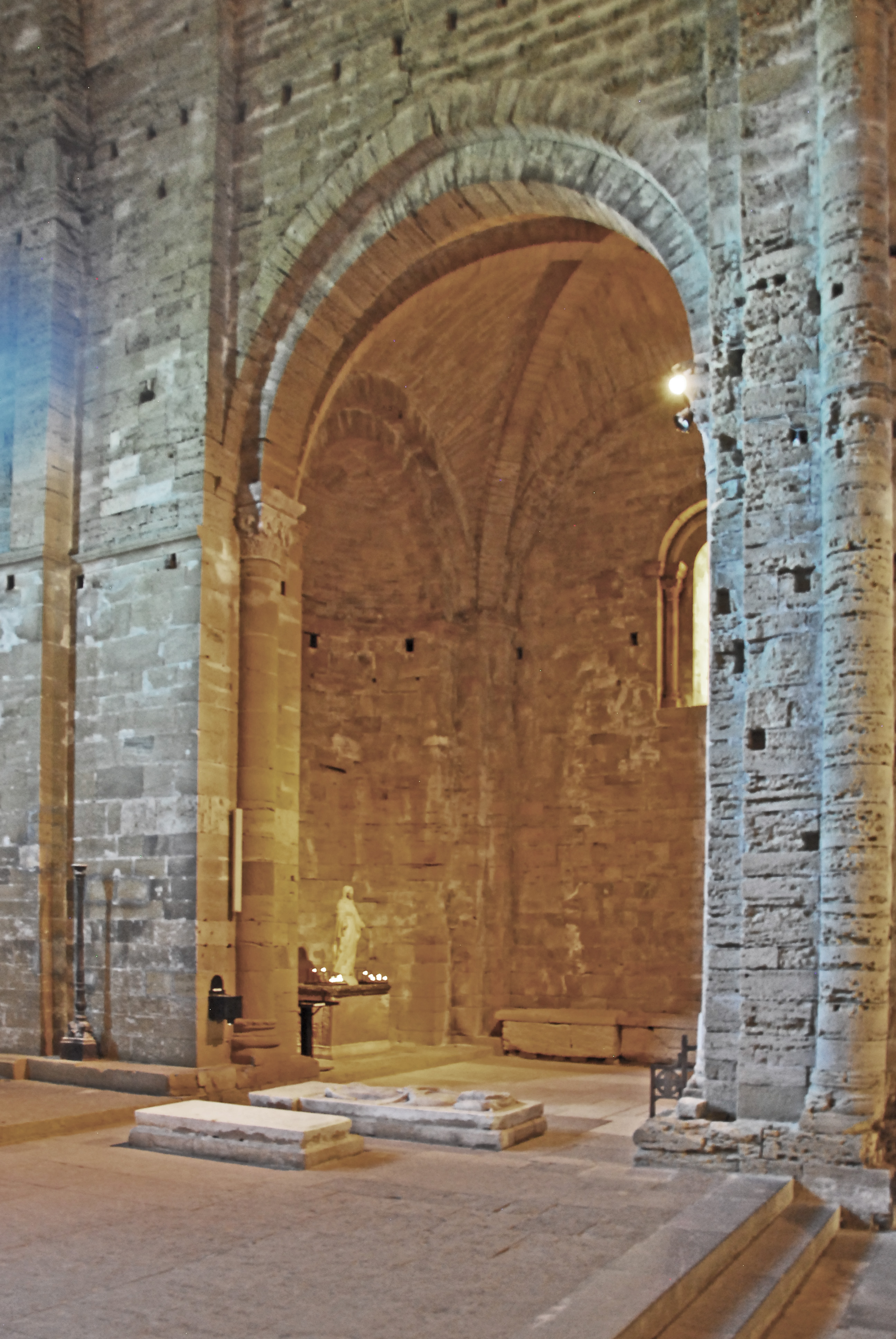 St-Pierre-et-St-Paul de Maguelone, Kapelle Südkreuz